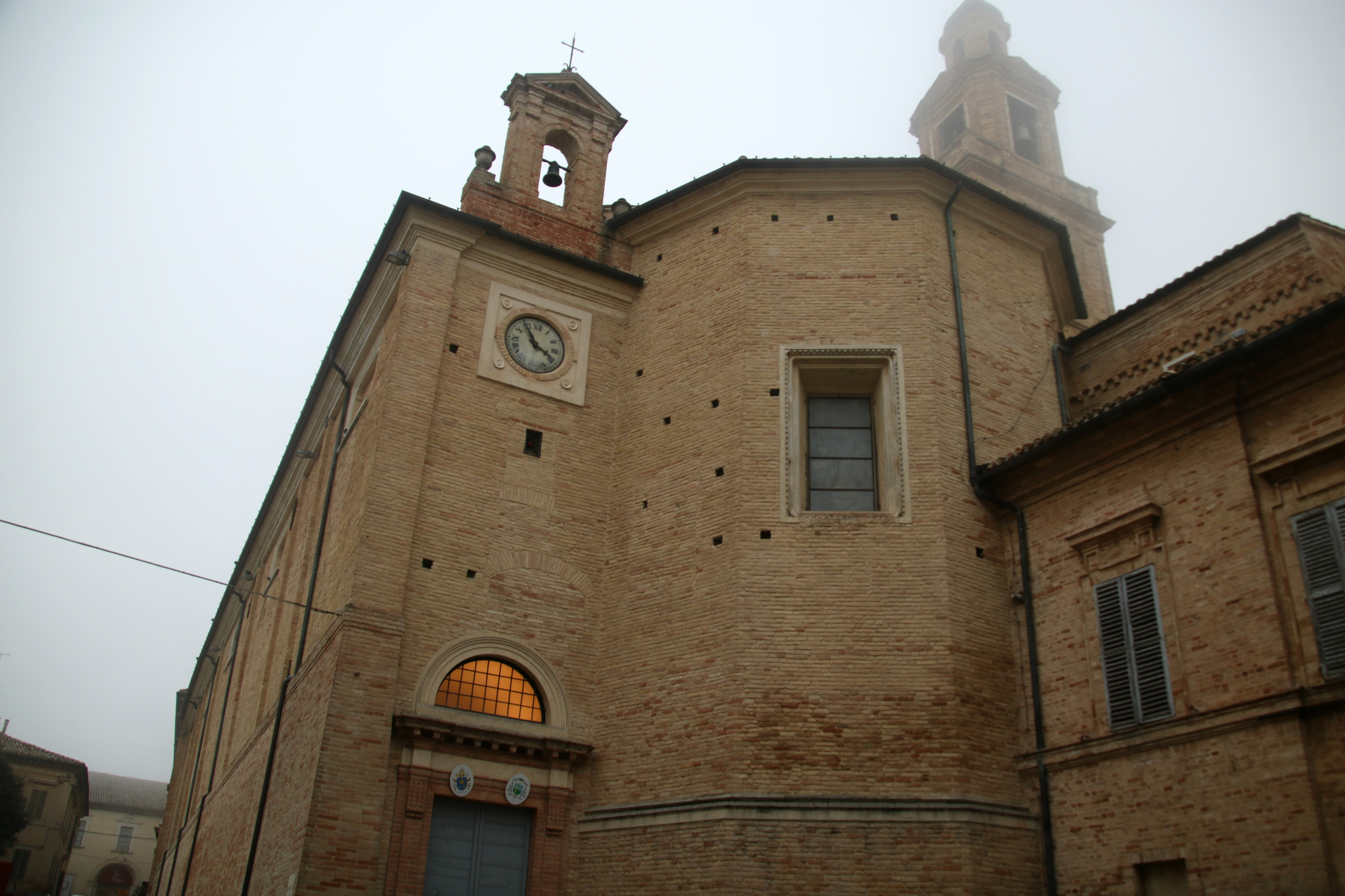 Concattedrale di San Flaviano (Recanati)